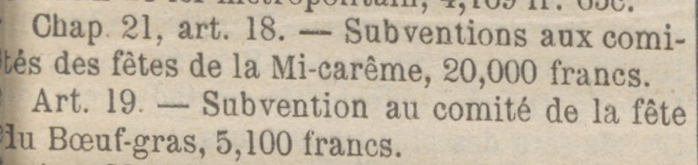 Extrait du budget adopté par la ville de Paris : les subventions aux fêtes de la Mi-Carême et au Comité du Bœuf Gras.